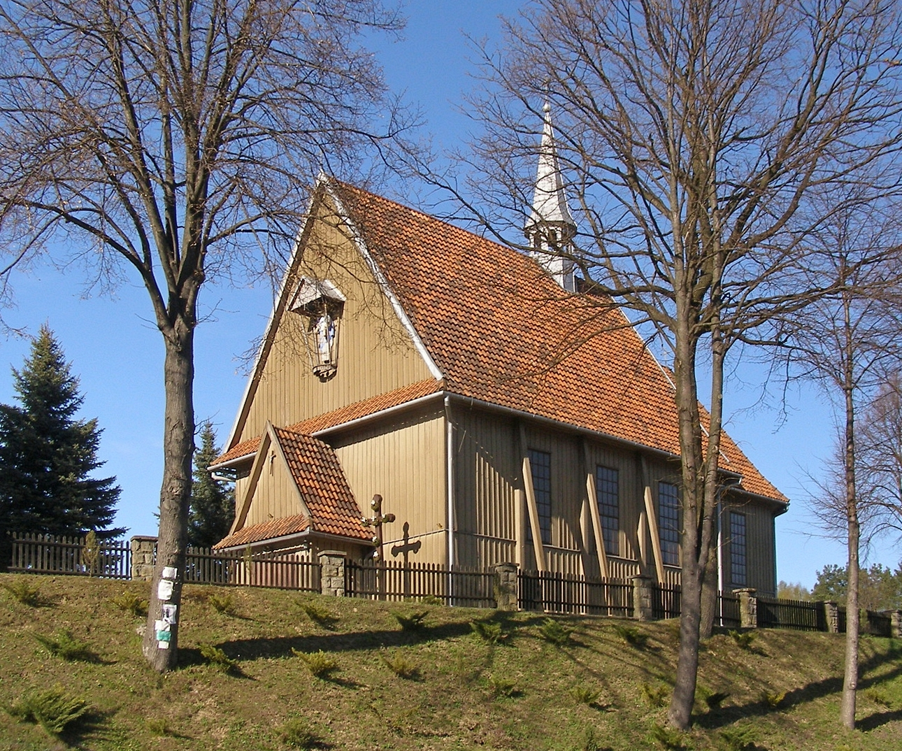 wieś Swoszowa